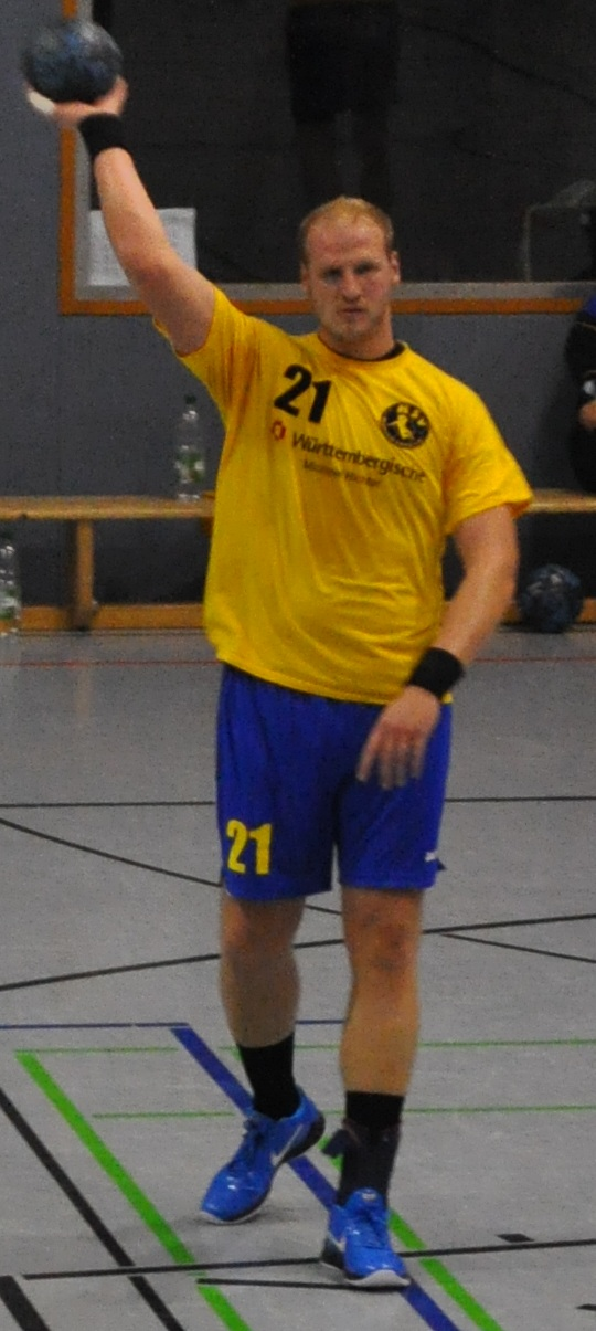 Der Handballspieler Marcel Effenberger von HSV Peenetal Loitz am 30. Oktober 2010 vor dem Spiel beim Stralsunder HV in der Vogelsanghalle Stralsund.